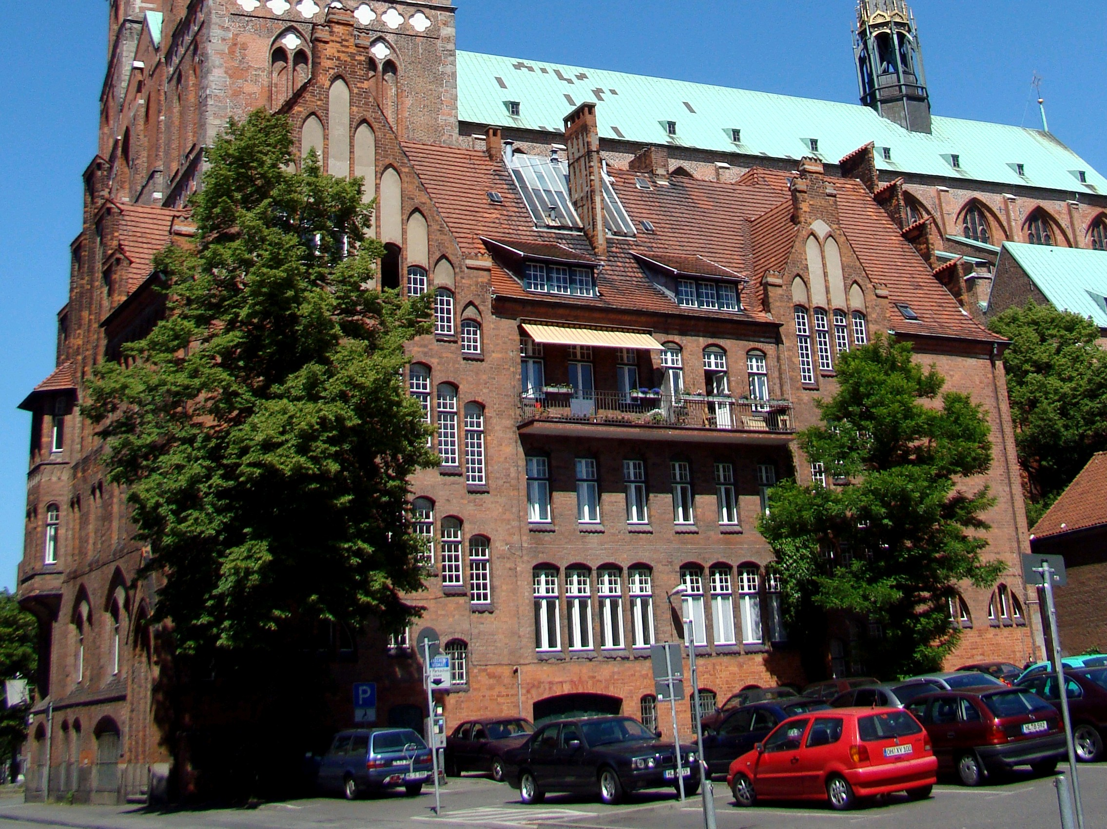 Marienwerkhaus, Lübeck